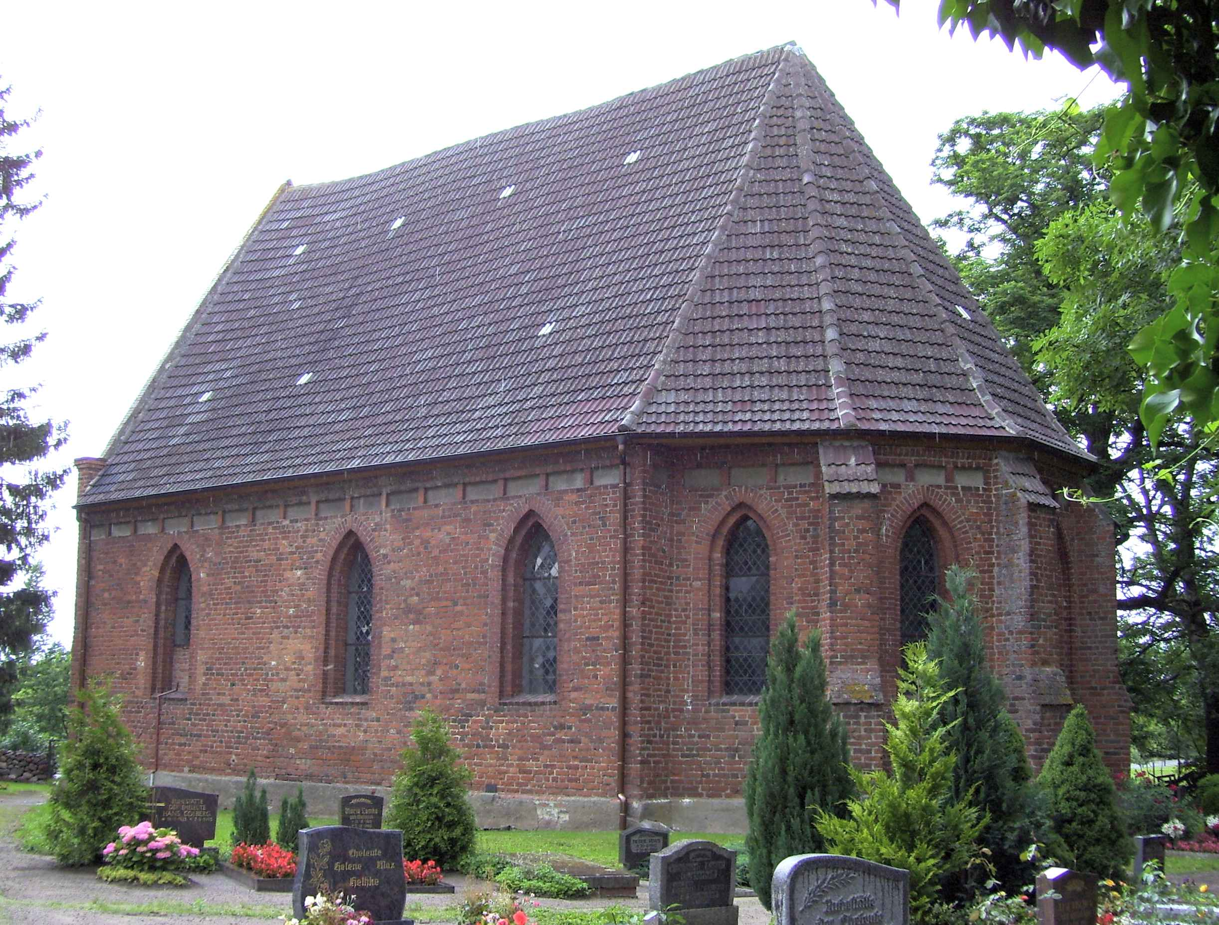 Schmarsow - Landkreis Demmin - Kirche